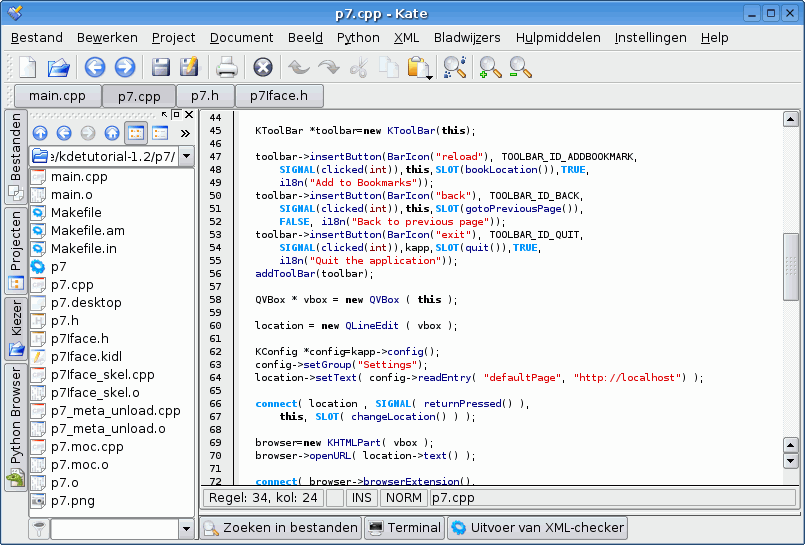 screenshot van een GNU FDL-programma nu eigen werk (NL versie)